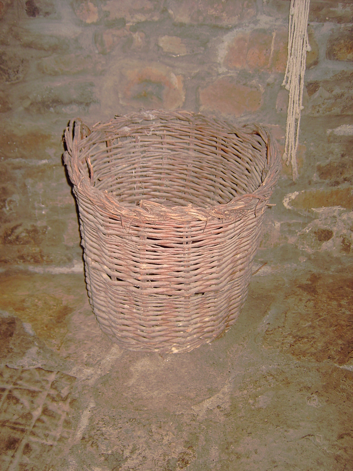 Cesta de grandes dimensiones empleada en la vendimia o bien para apacentar a las caballerías en los descansos.